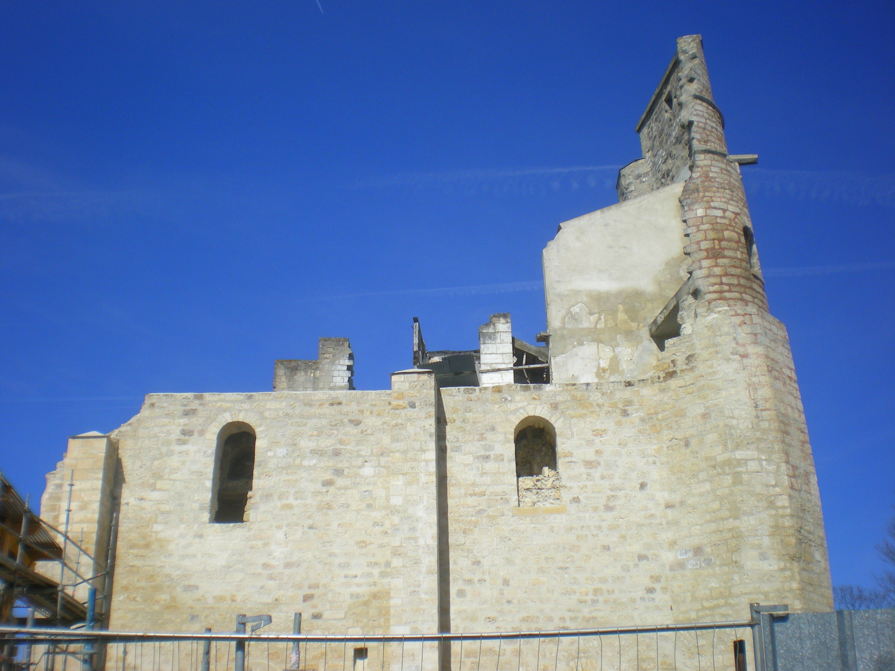 La façade ouest de l'ancien donjon de Clermont (60) après restauration.